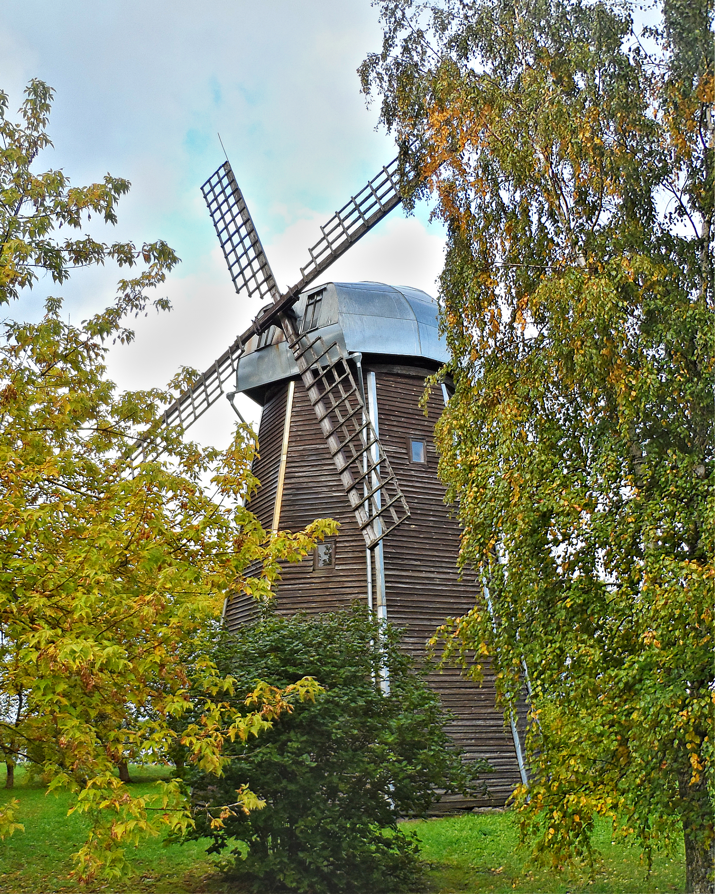 malunas